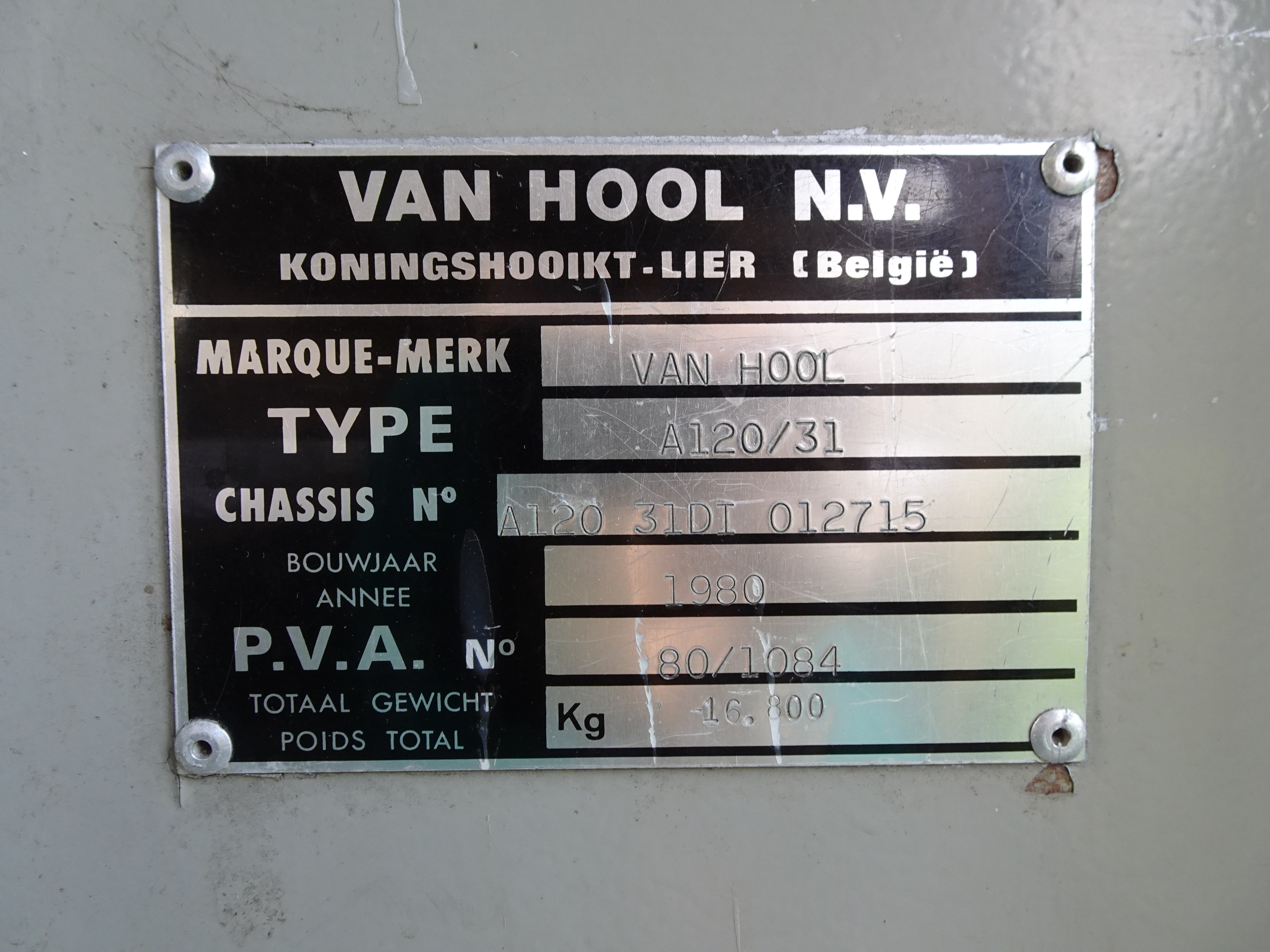 Plaque de constructeur d'un des trois autobus. Il y avait deux A120/31 (1980 et 1981) ainsi qu'un A120 de 1978.